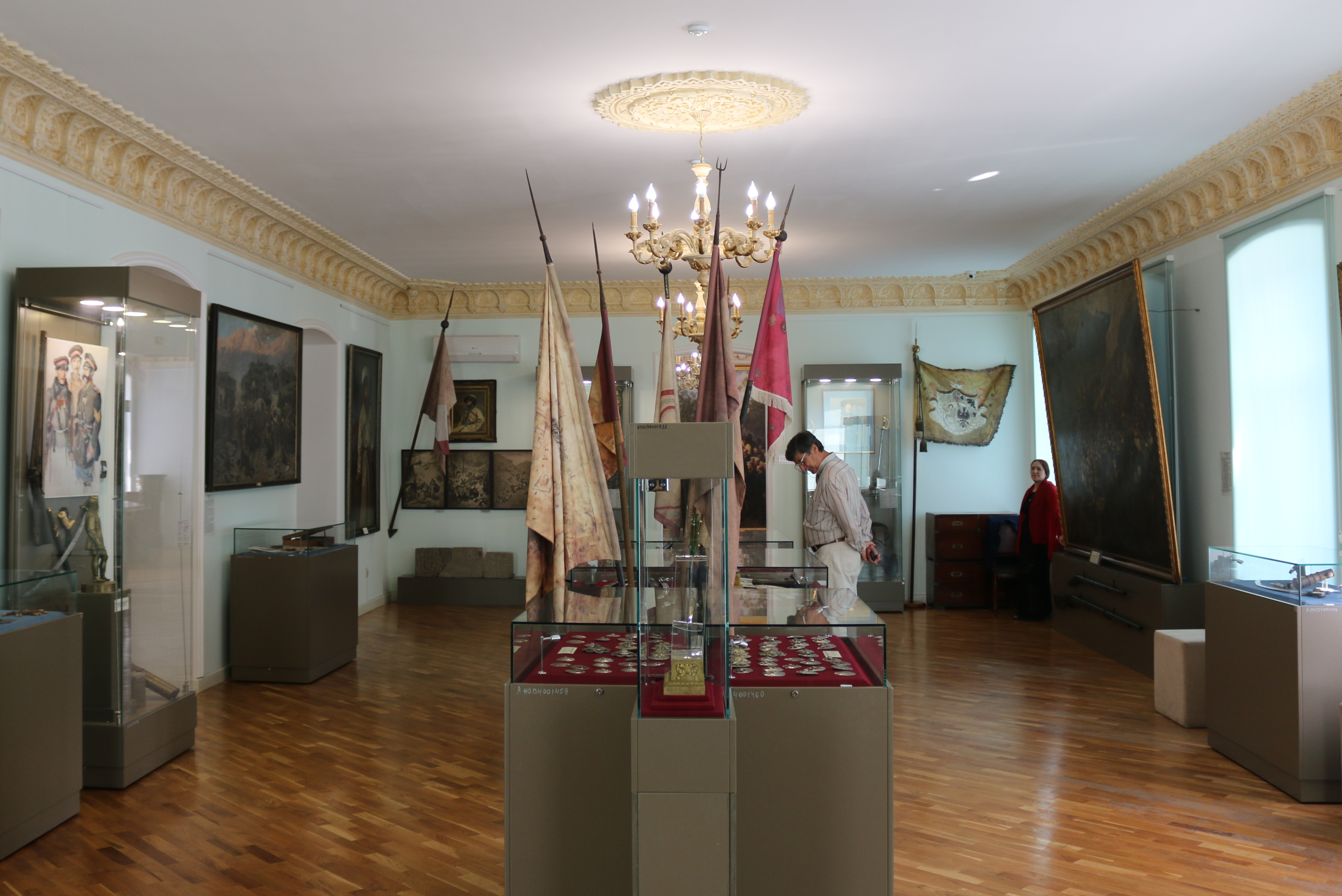 موزه ملی جمهوری داغستان در ماخاچ قلعه (۲۰۱۹) - عکس: شبکه ایرانیان هلند